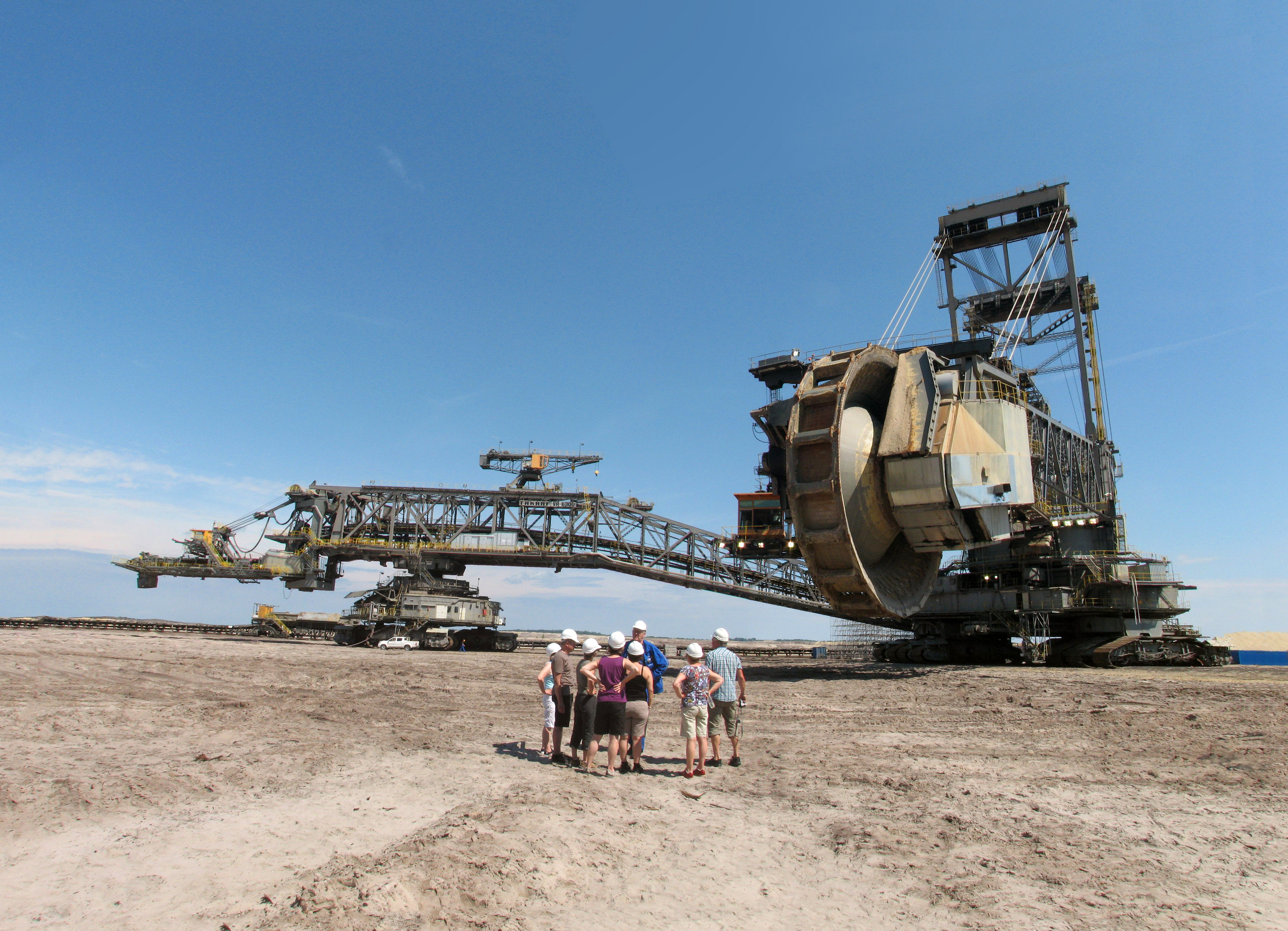 Tagebau Welzow-Süd – Besichtigung (Kann bitte mal ein Fachmann/-frau den Typ des Fördergerätes hier eintragen? Danke!)